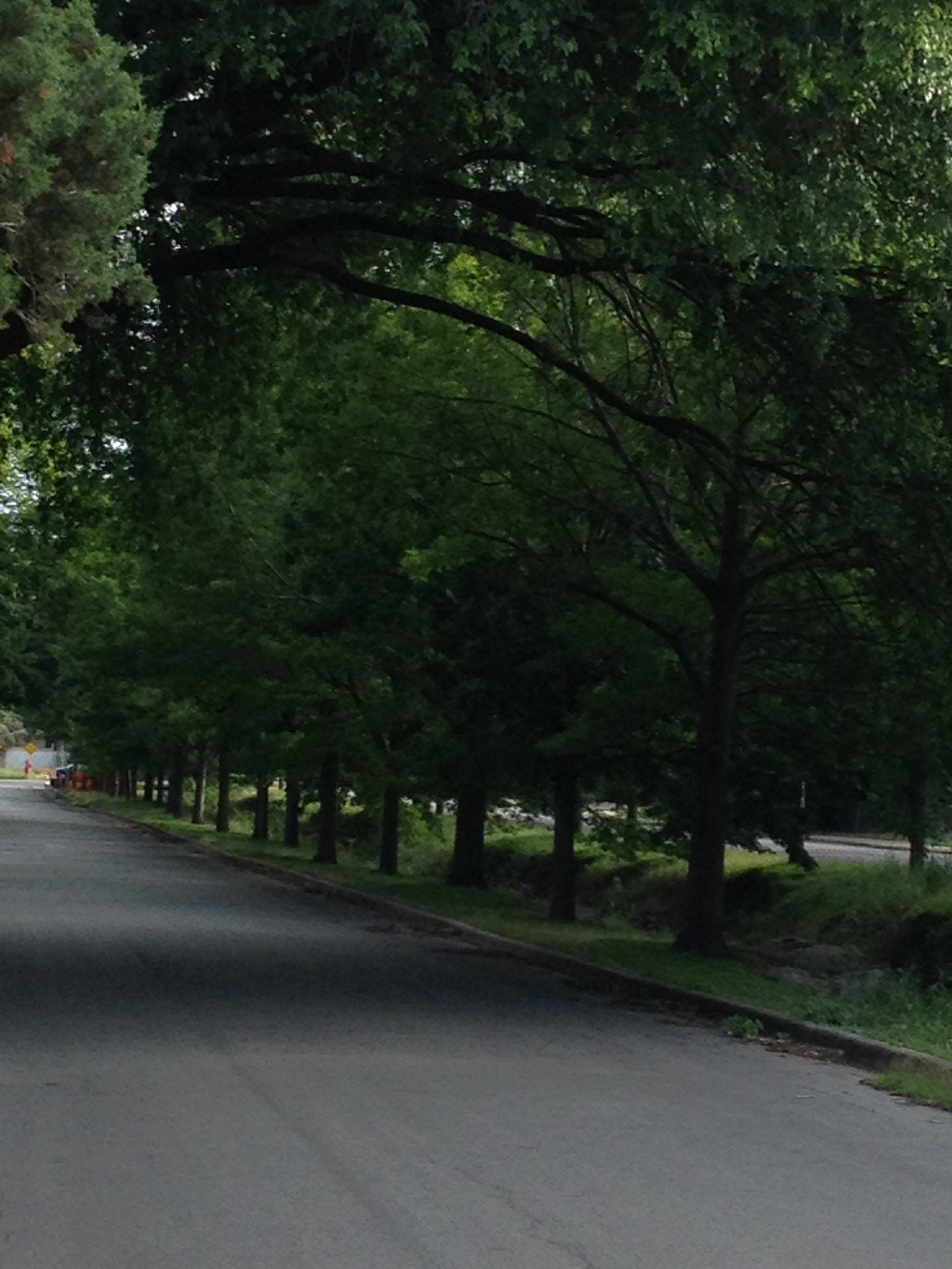 Arroyo Seco